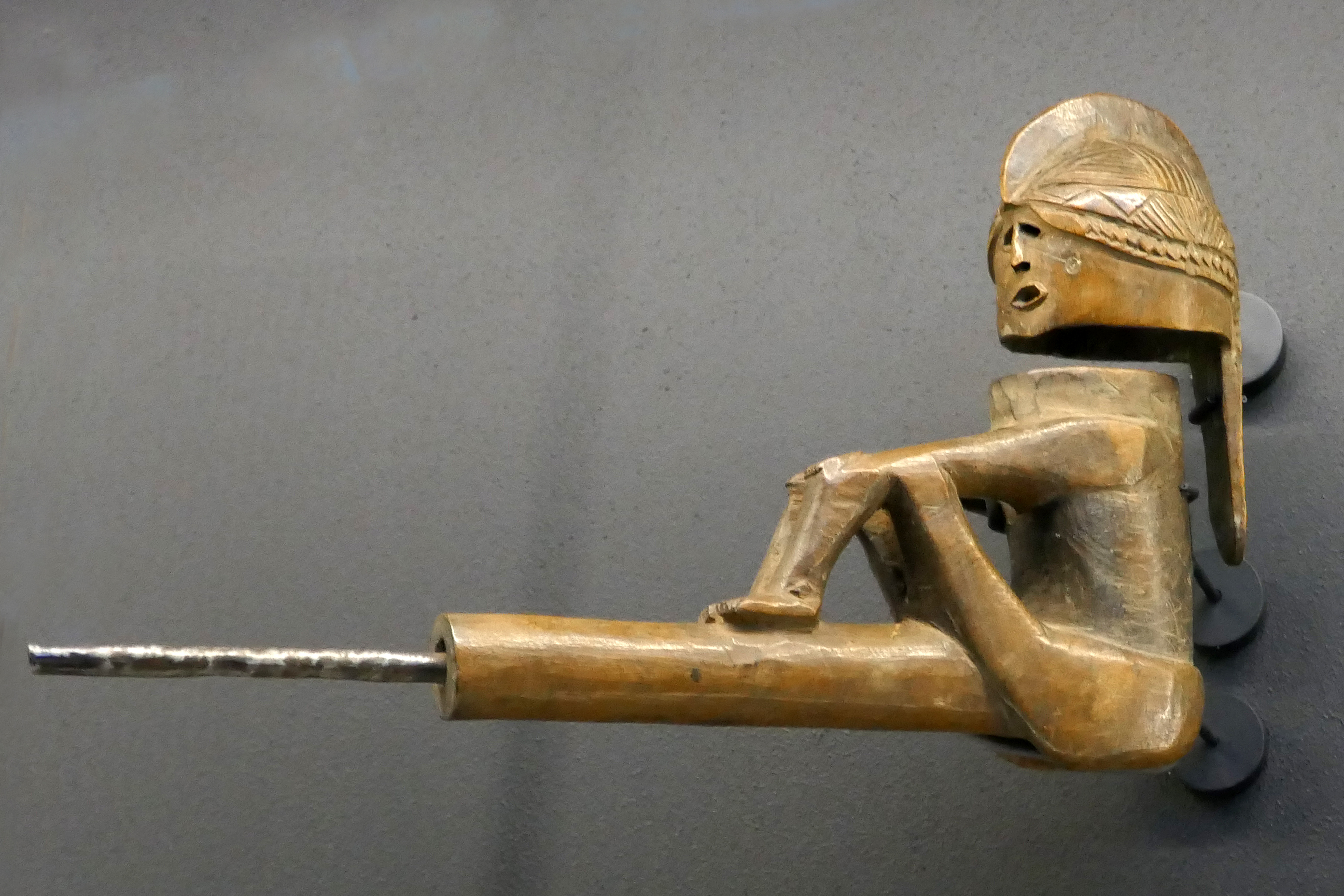 Pipe à couvercle Ovimbundu 19e siècle Bois, métal Musée du Quai Branly Donateur : Jacques de Rohan-Chabot N° d'inventaire :71.1912.15.25.1-2